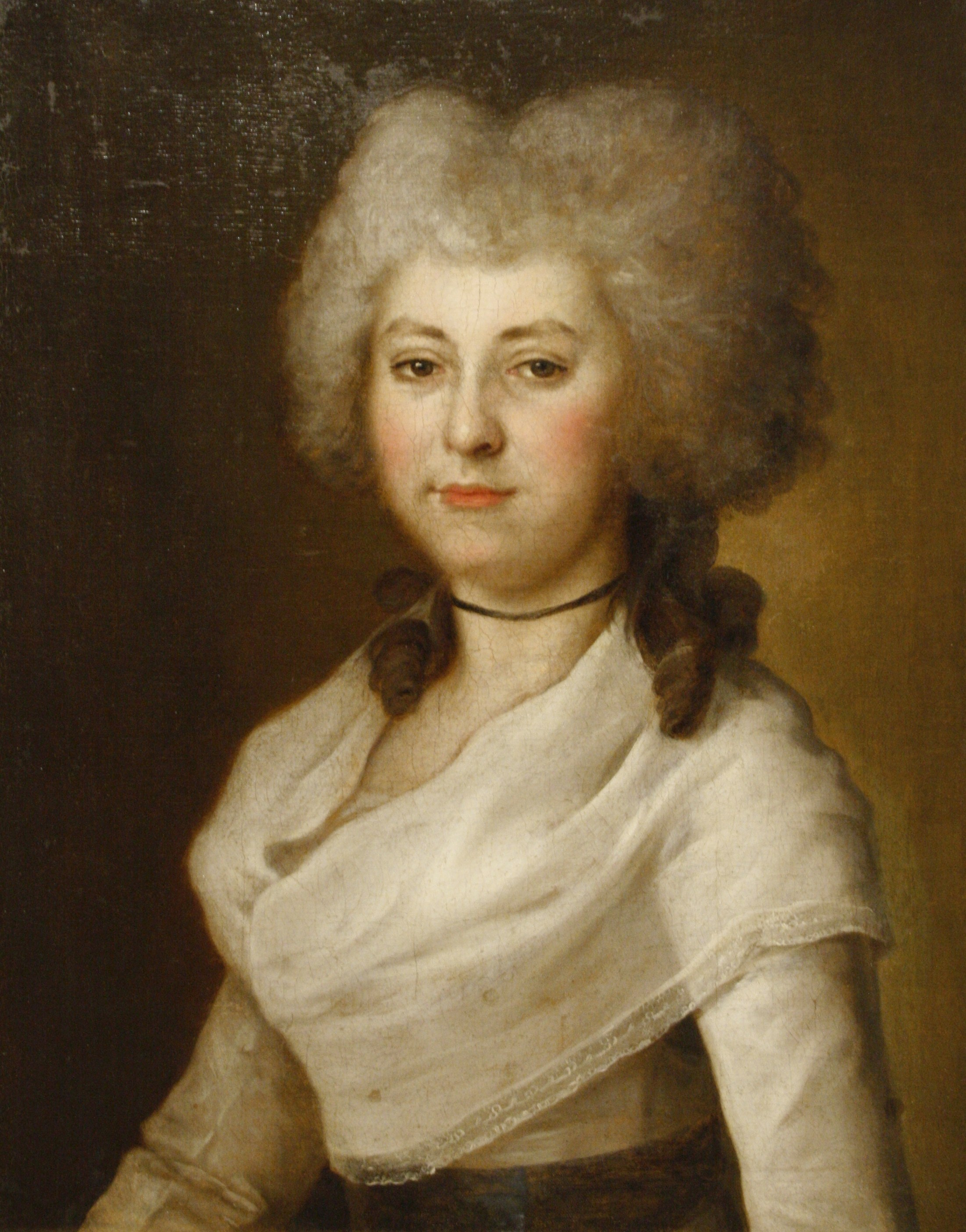 Степанида Ивановна Голенищива-Кутузова (1770—1805), в первом браке Букунина, во втором — баронесса Бюлер.